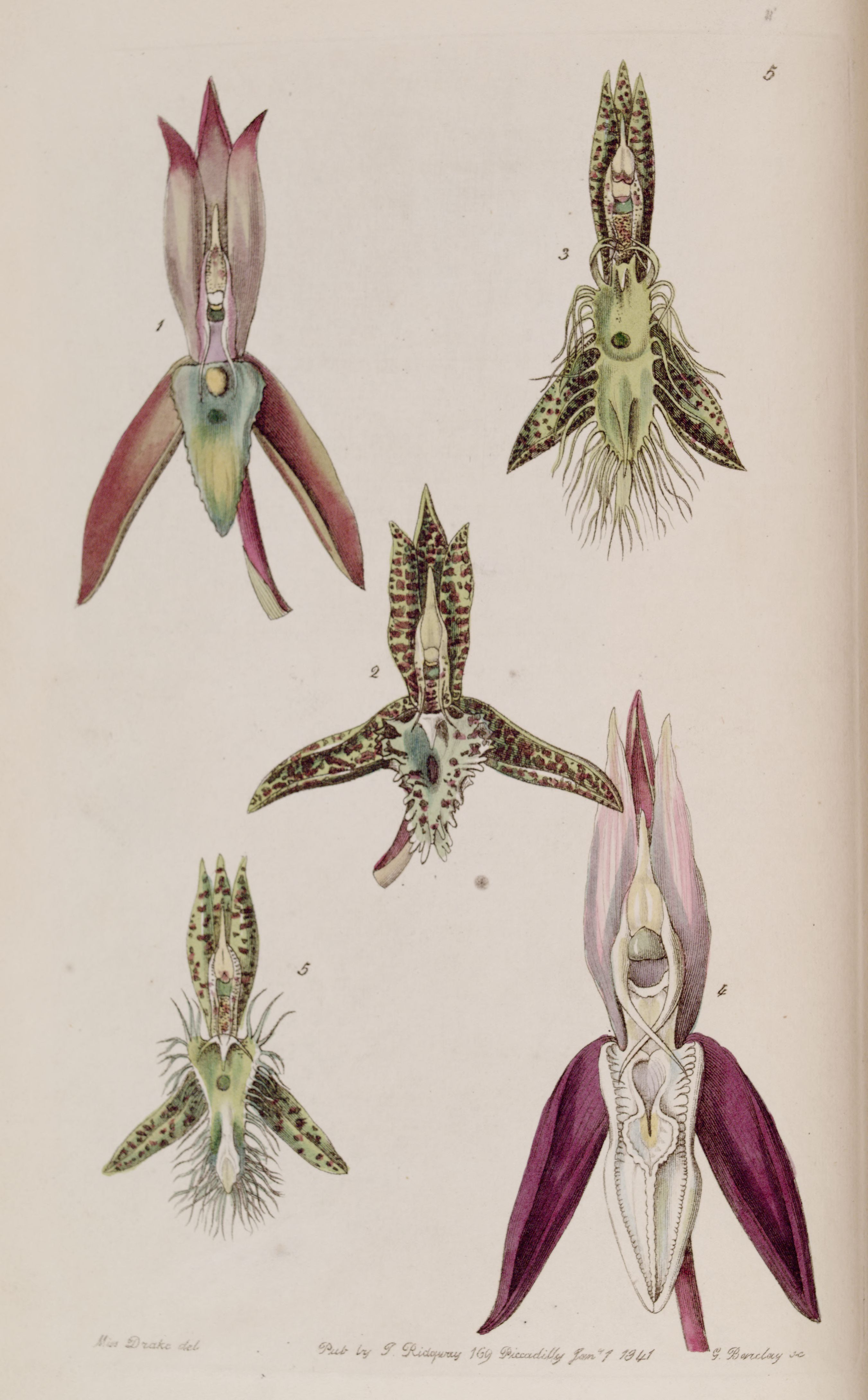 Illustration of I. Catasetum callosum II. Catasetum cristatum (as syn. Catasetum cornutum) III. Catasetum barbatum IV. Catasetum laminatum V. Catasetum lanciferum